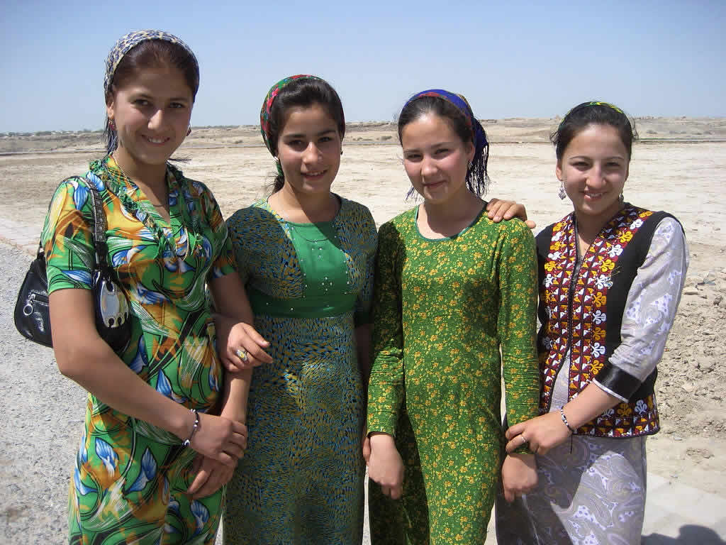 female visitors, Merv archaeological site, Turkmenistan